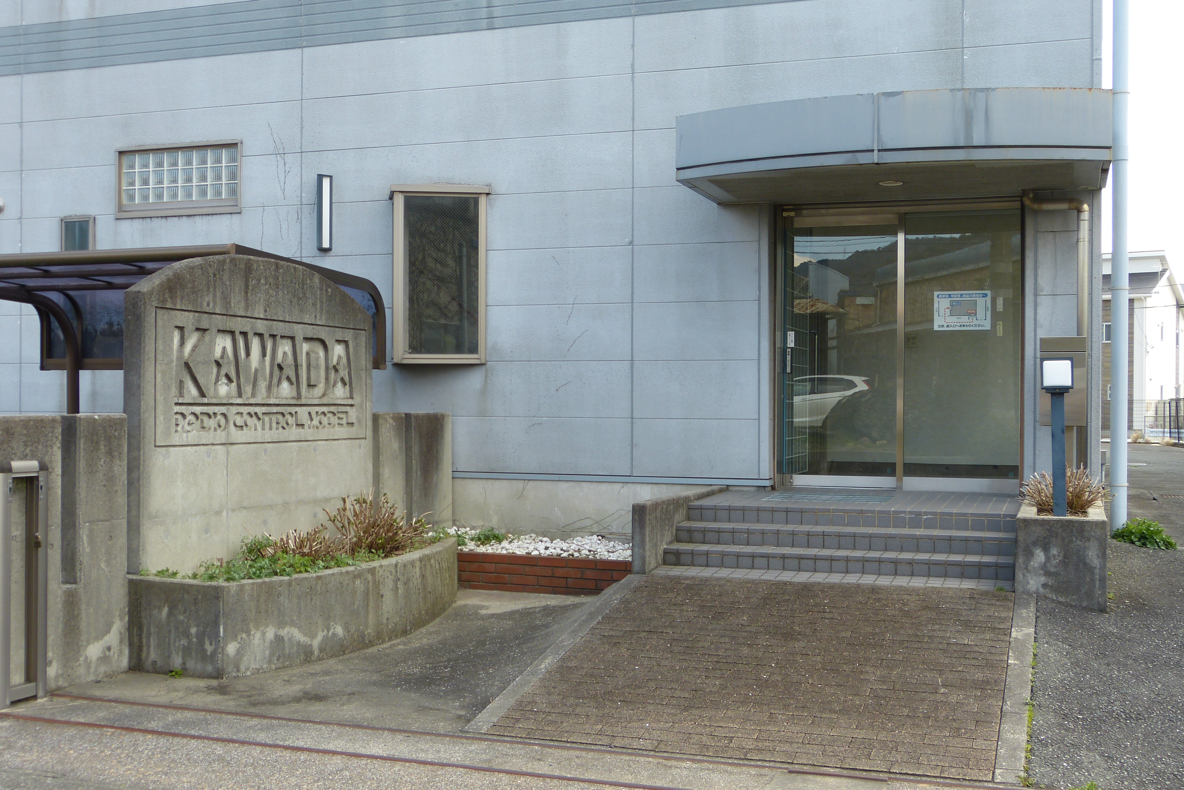 川田模型社屋